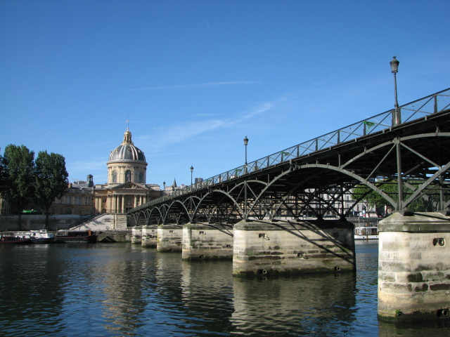 Le pont des Arts vu depuis le bas du quai de la rive droite. Au fond l'institut de France.